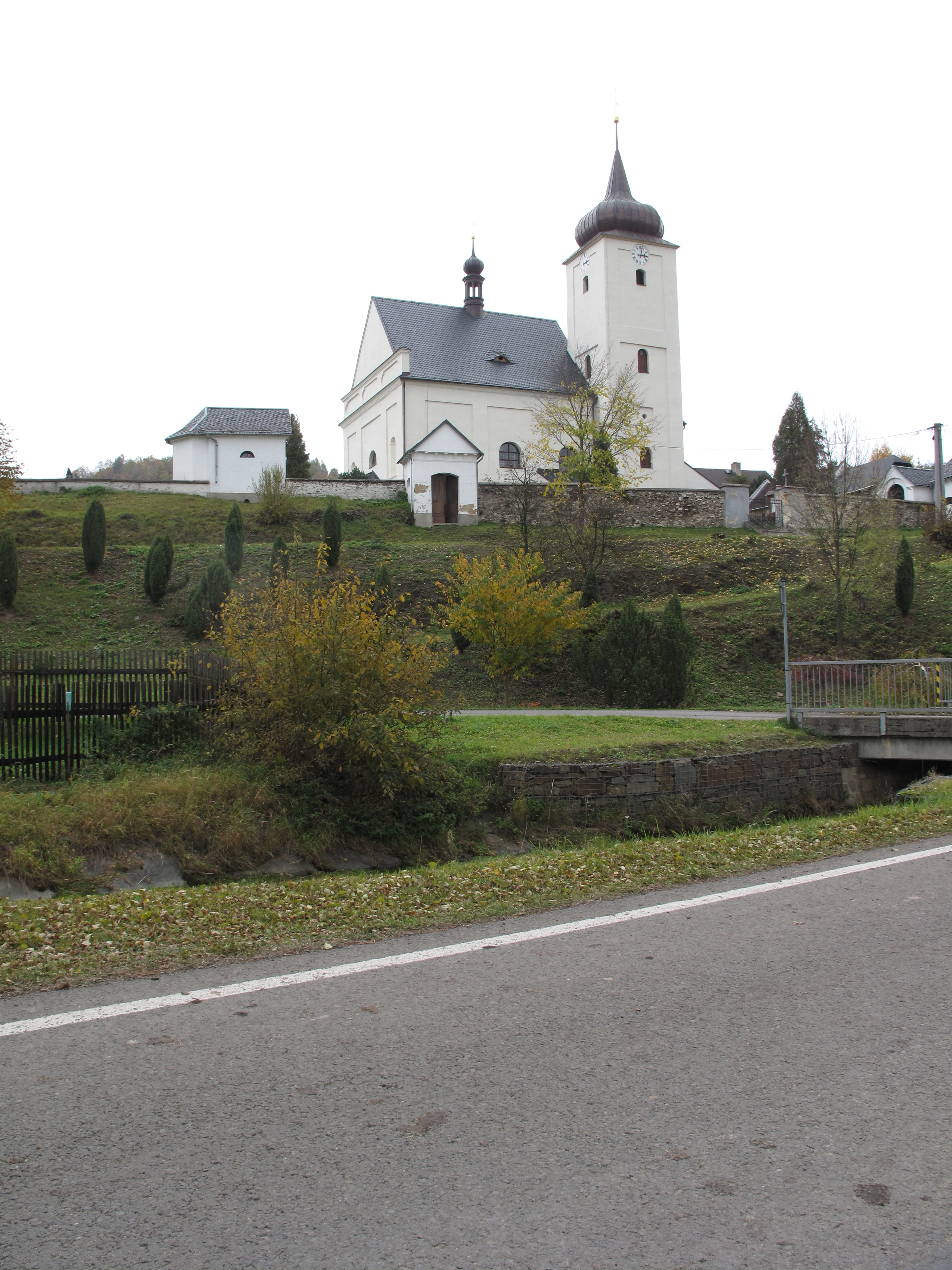 Krasov. Okres Bruntál, Česká republika.